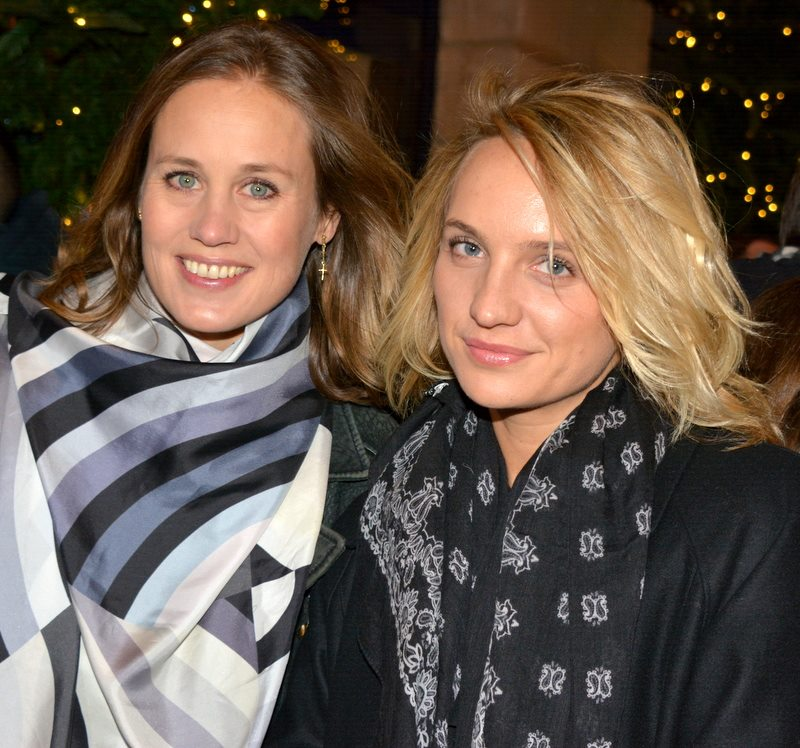 Eloïse Lang et Noémie Saglio, créatrices de "Connasse", au dîner des révélations des César du cinéma